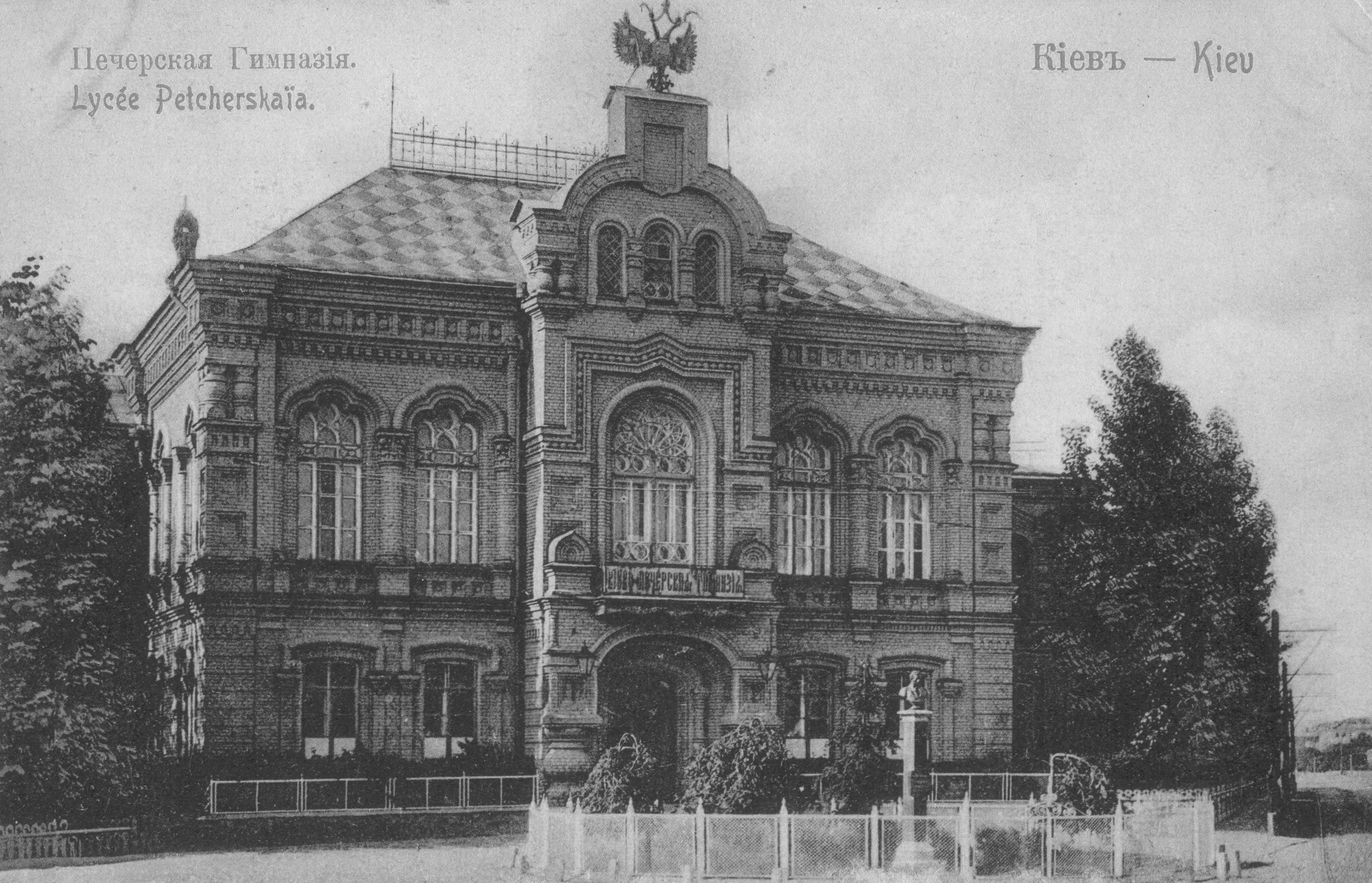 Здание 5-й (Печерской) гимназии в Киеве. Начало ХХ в.